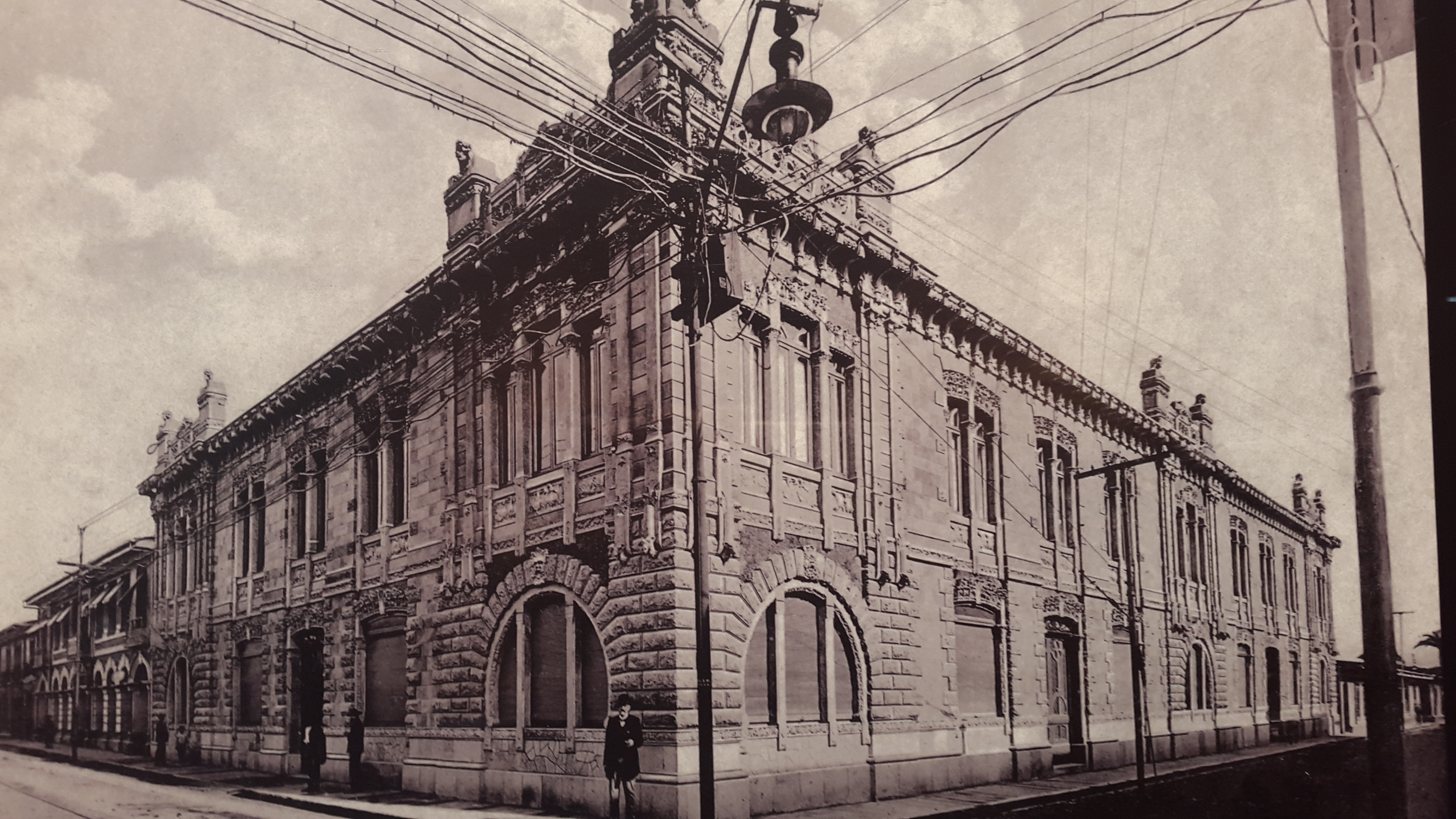 El Edificio Steinvorth en 1908. Fotografía tomada por Fernando Zamora Salinas (fallecido en 1926), actualmente es parte de la colección fotográfica del Museo Nacional de Costa Rica.